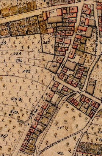 Buheleiten-Vorstadt Marktbreit, Aufnahme im Urkataster 1825